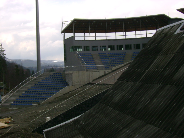 Trybuny_w_budującej_się_skoczni_Malinka